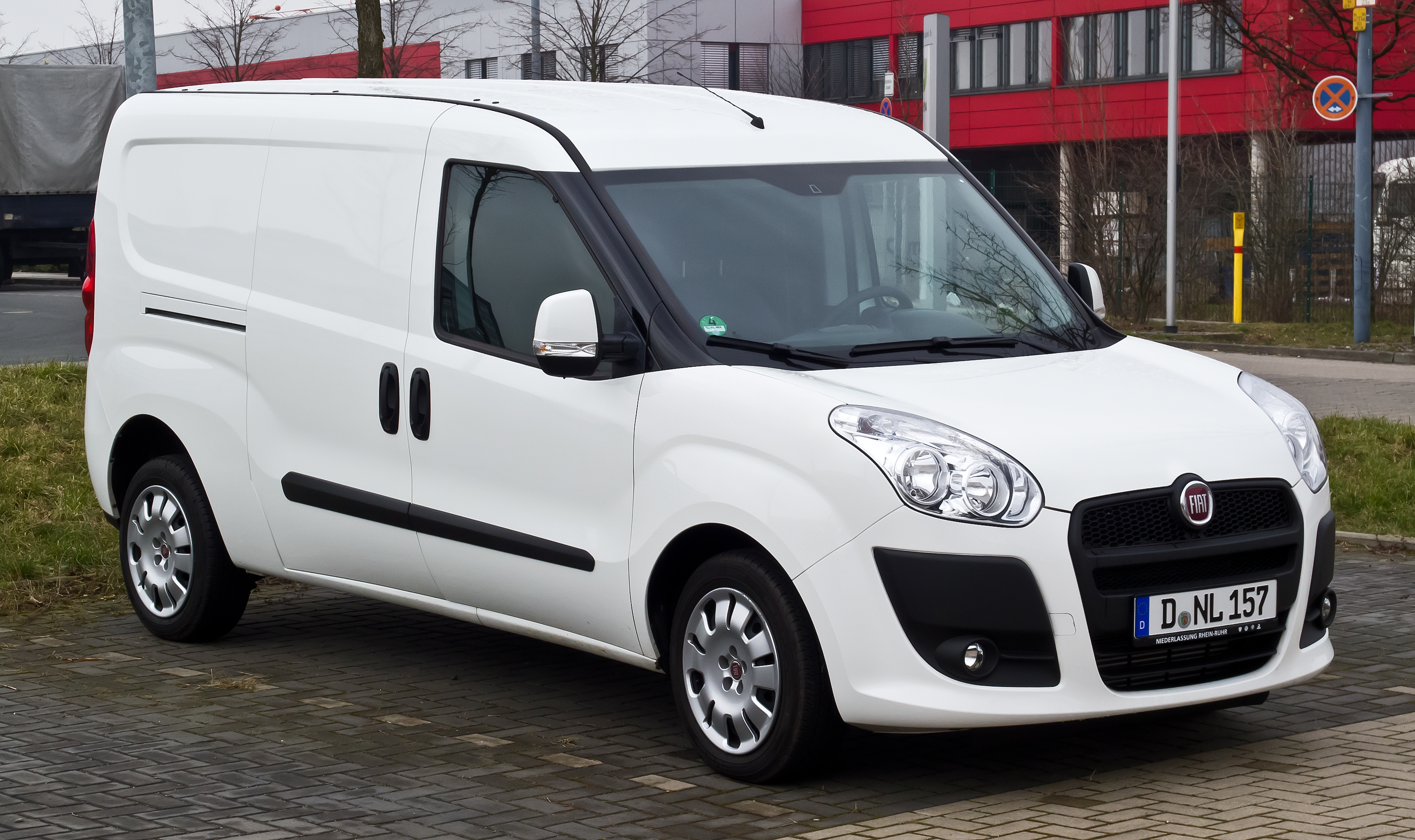 Fiat Doblò Cargo Maxi 1.6 16V Multijet (II)